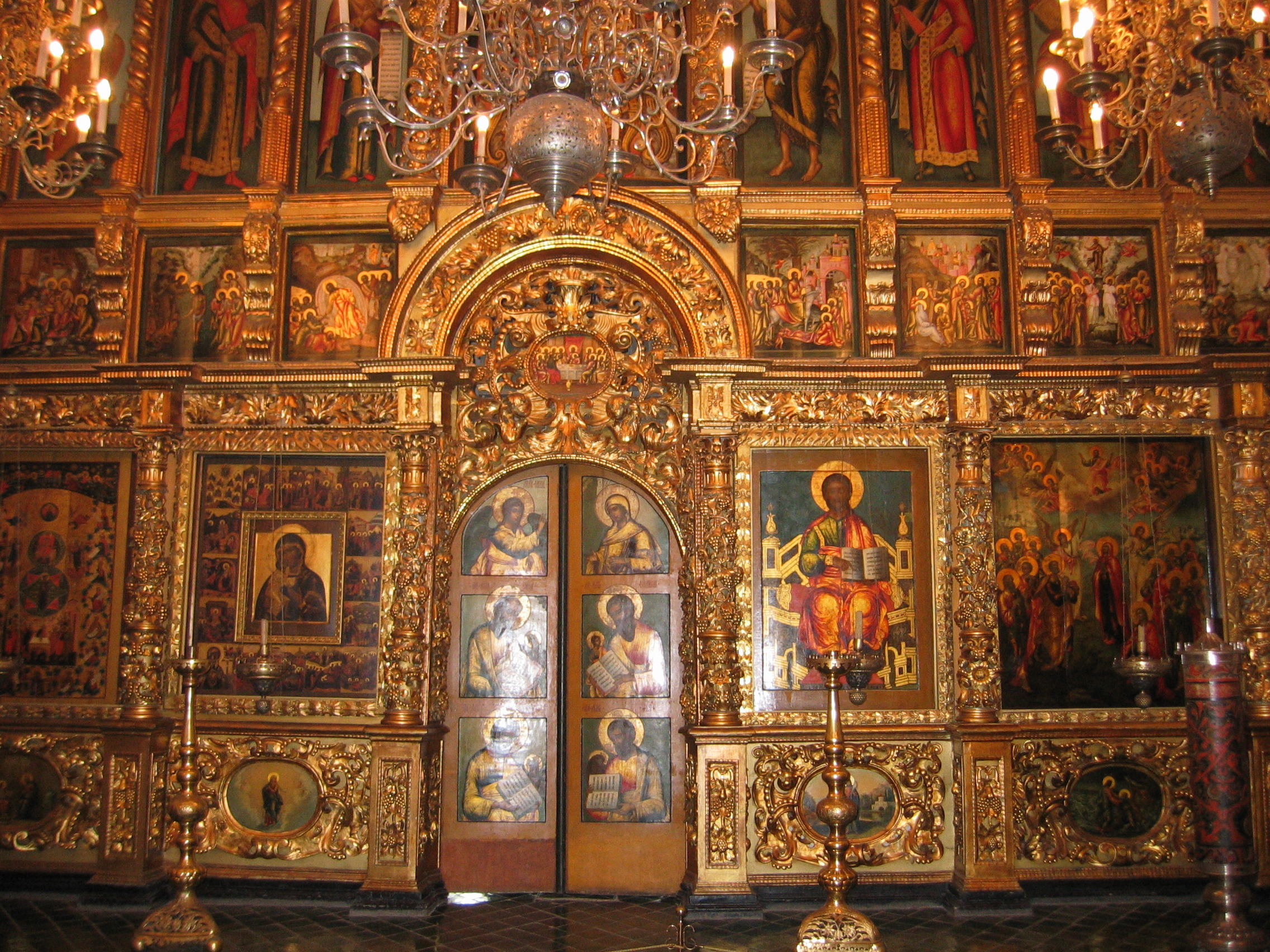 Iconostase de la cathédrale des 12 Apôtres (Kremlin de Moscou)